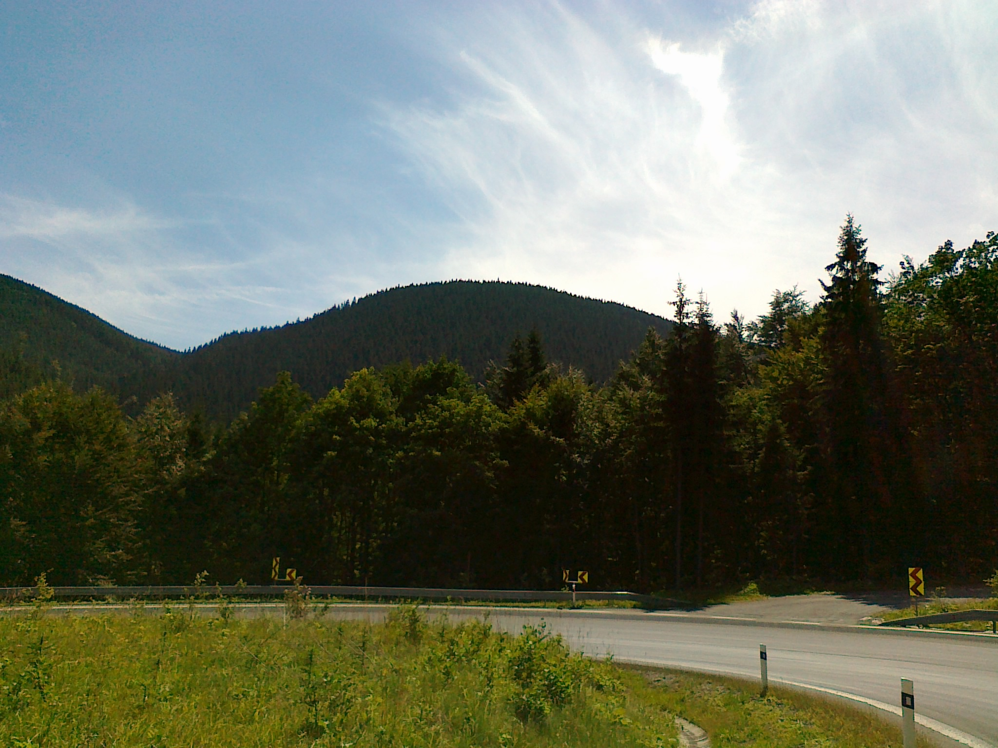 Widok z drogi nr 44 na górę Velký Klínovec - 1166 m